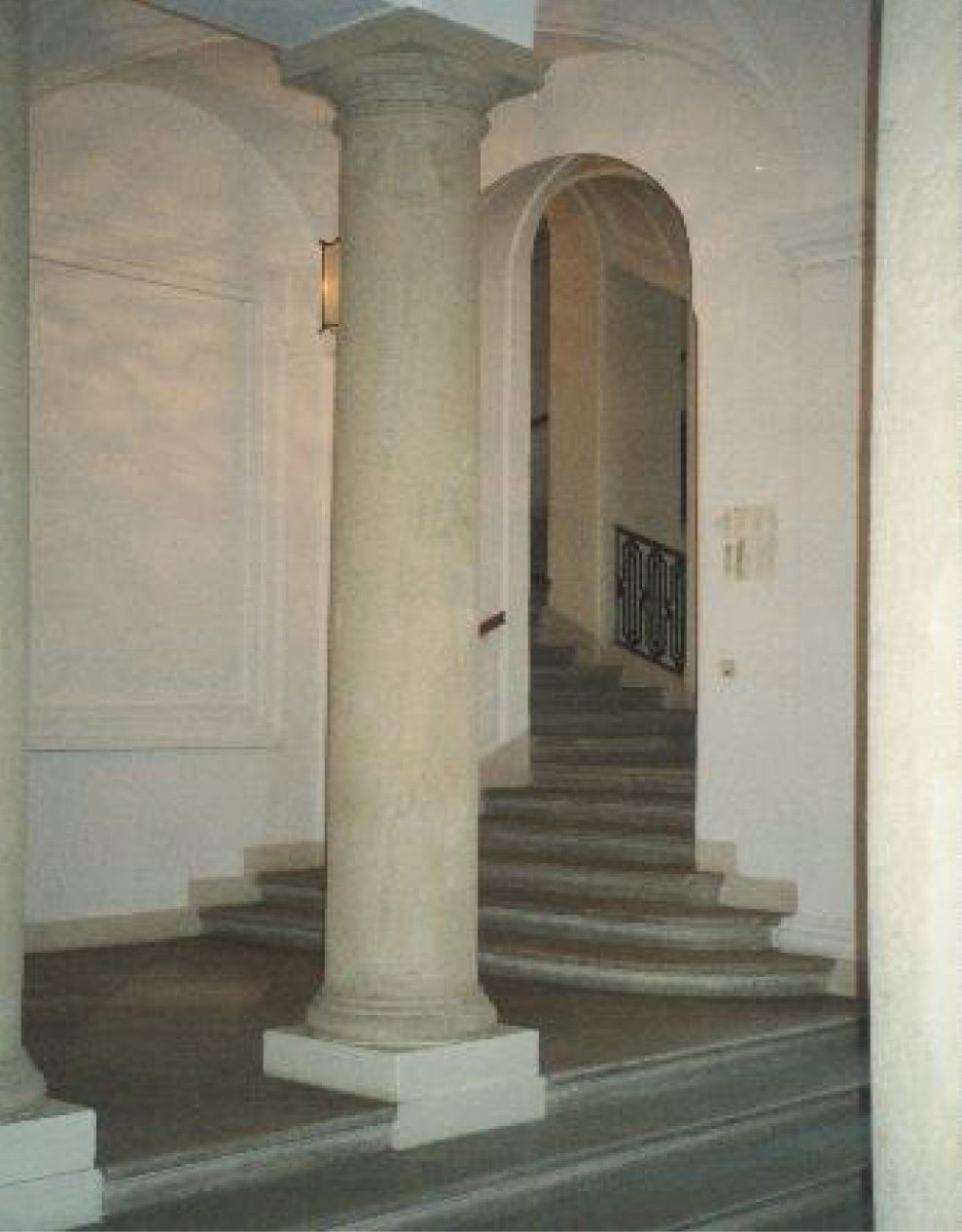 Palais Caprara-Geymüller, Wallnerstraße 8, Säulenvestibül Kaisersteinstiege